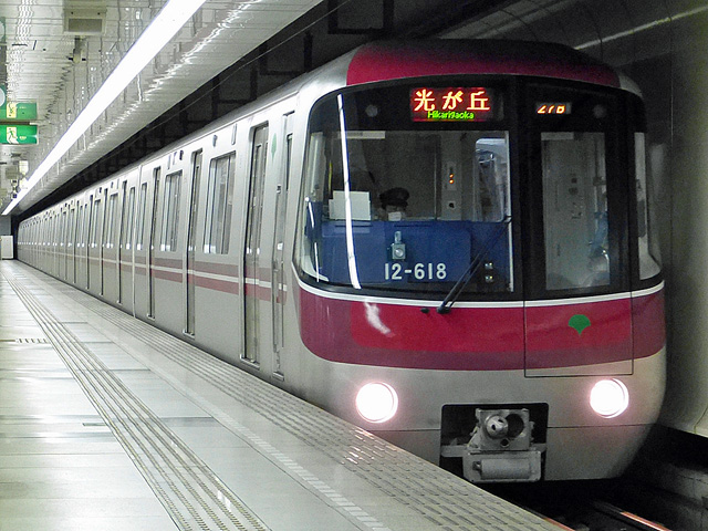 東京都交通局12-600形 大江戸線光が丘駅にて撮影。